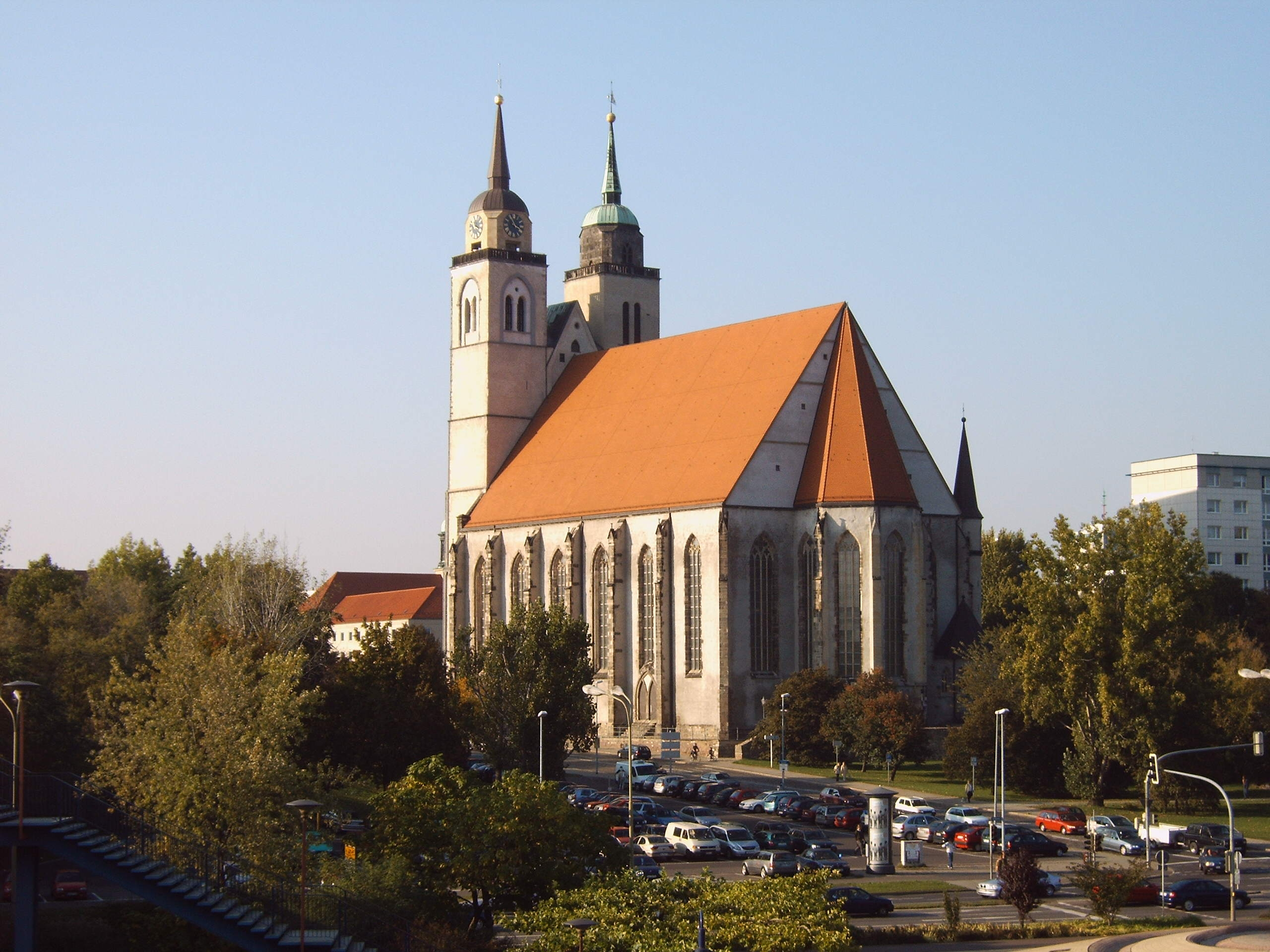 Johanniskirche in Magdeburg.